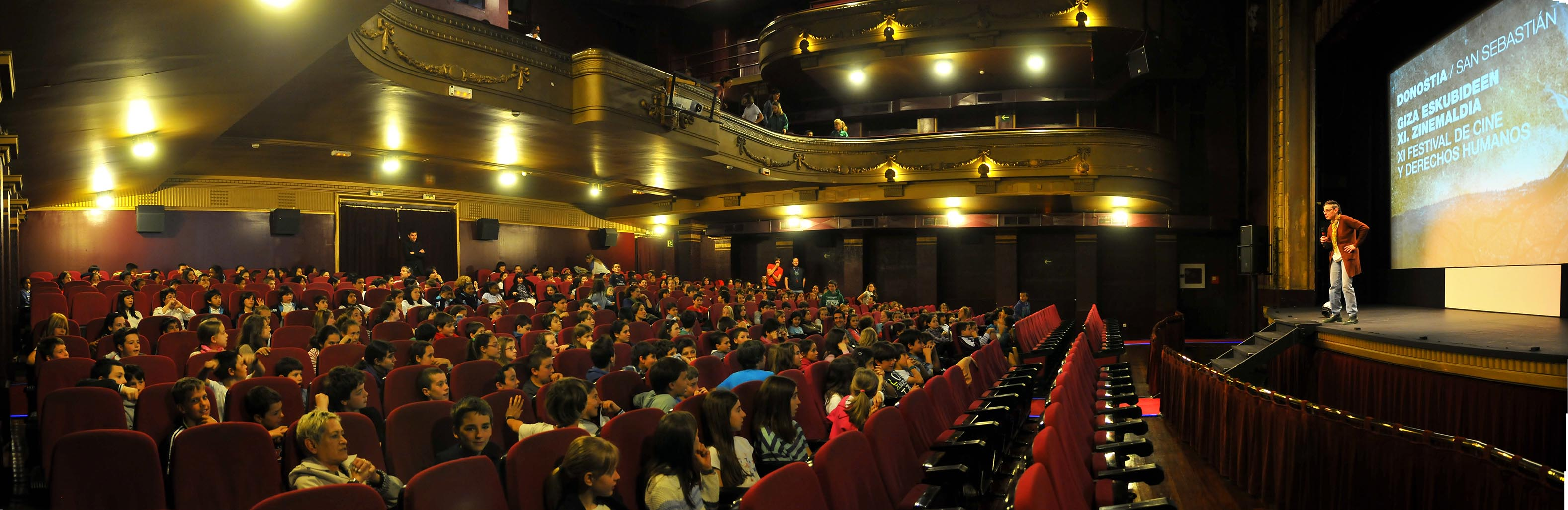 Gazteentzako saioa Sesión juvenil Argazkia / Fotografía: Iñigo Royo